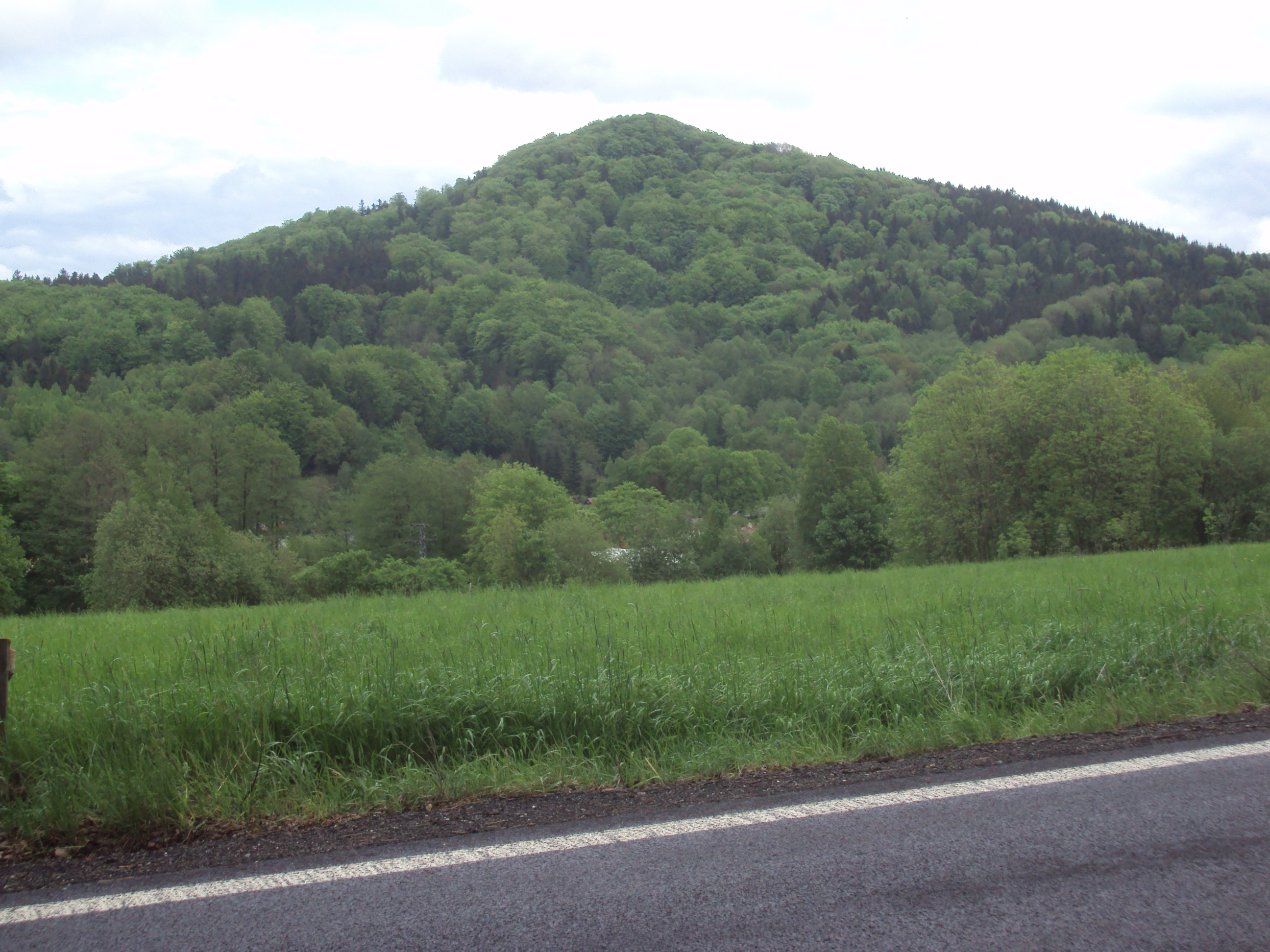 Kamenický vrch 632 m. je u města Kamenický Šenov, asi Lužické hory, fotka z ulice Nový Svět